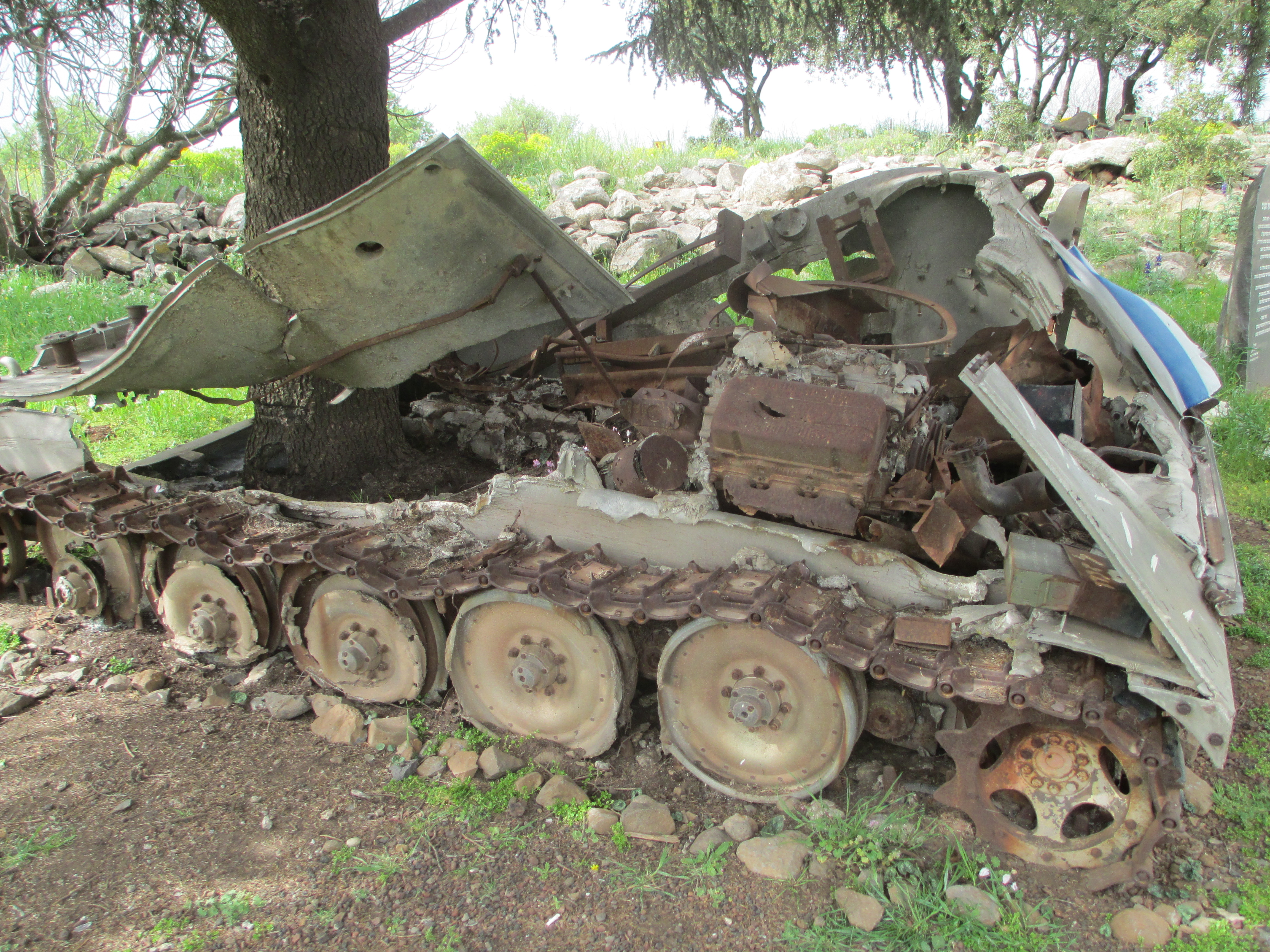 אנדרטת הנגמ"ש והארז בגולן